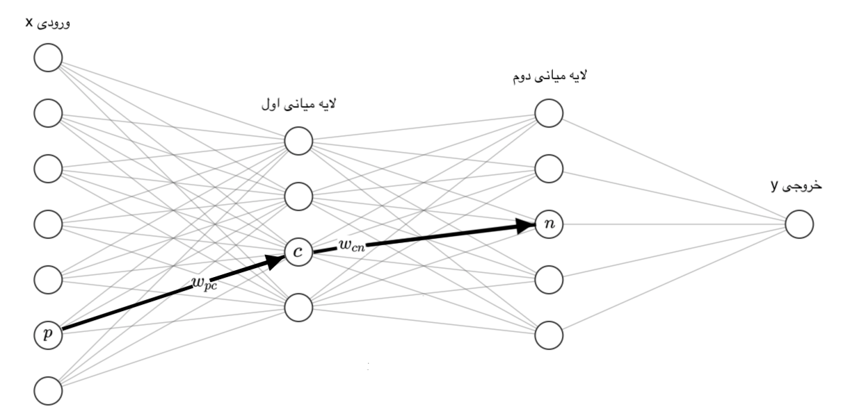 یک شبکه عصبی چهار لایه‌ای، با وردودی هفت سلولی و دو لایه میانی چهار و پنج سلولی.